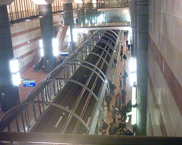 Station Bibiotheque Nationale du Métropolitain de Paris.